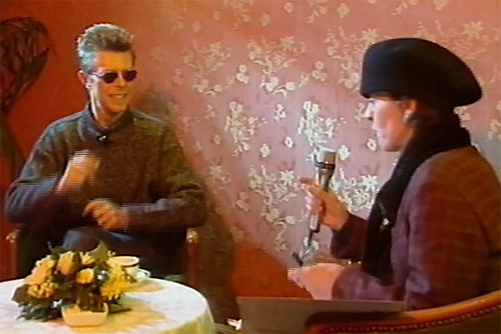 Febbraio 1996 - Milano - Hotel Principe di Savoia - intervista a David Bowie